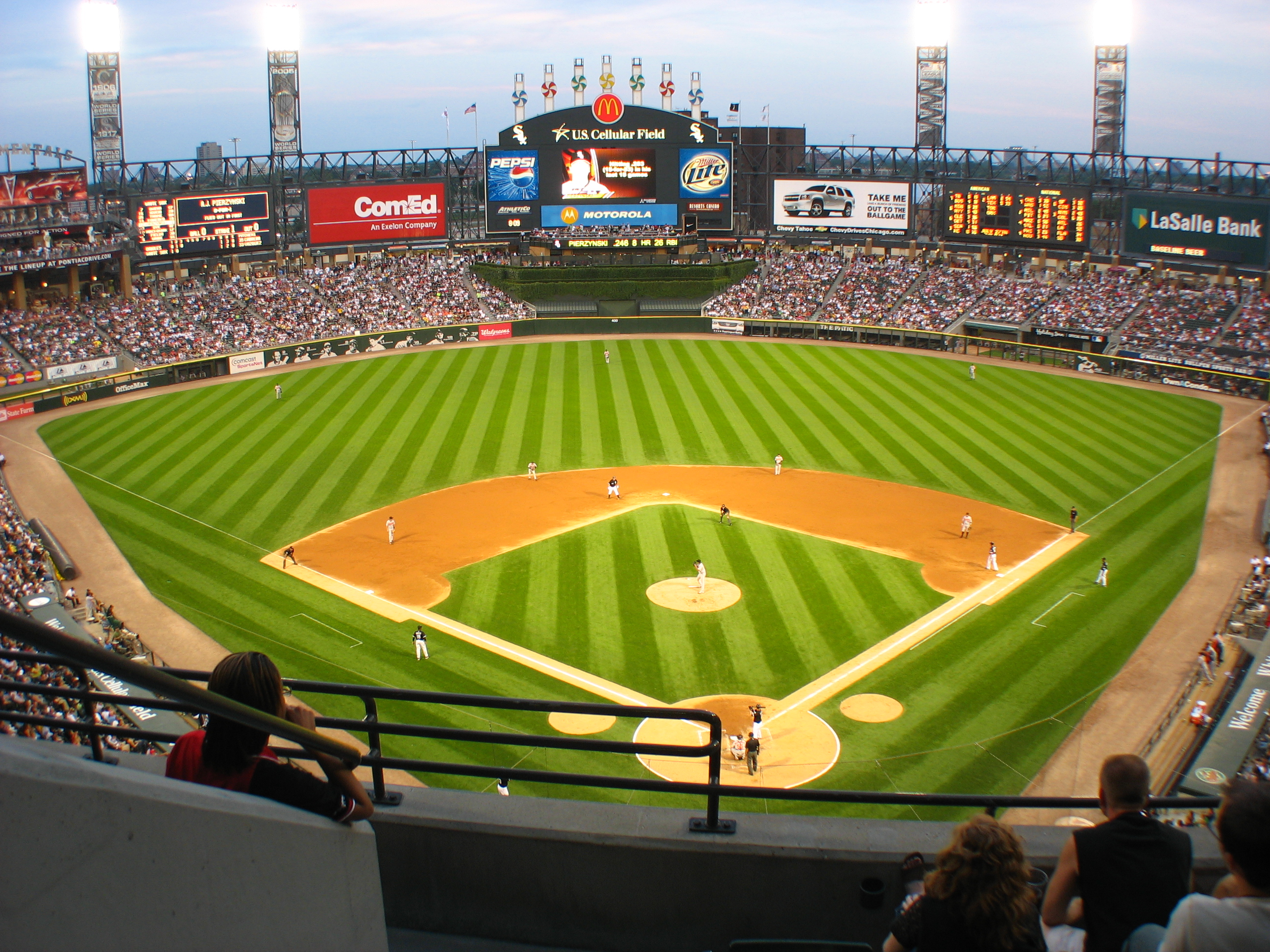 U.S. Cellular Field 19:57, 5 August 2007 . . Zukkie44 . . 2592×1944 (2.42 MB)